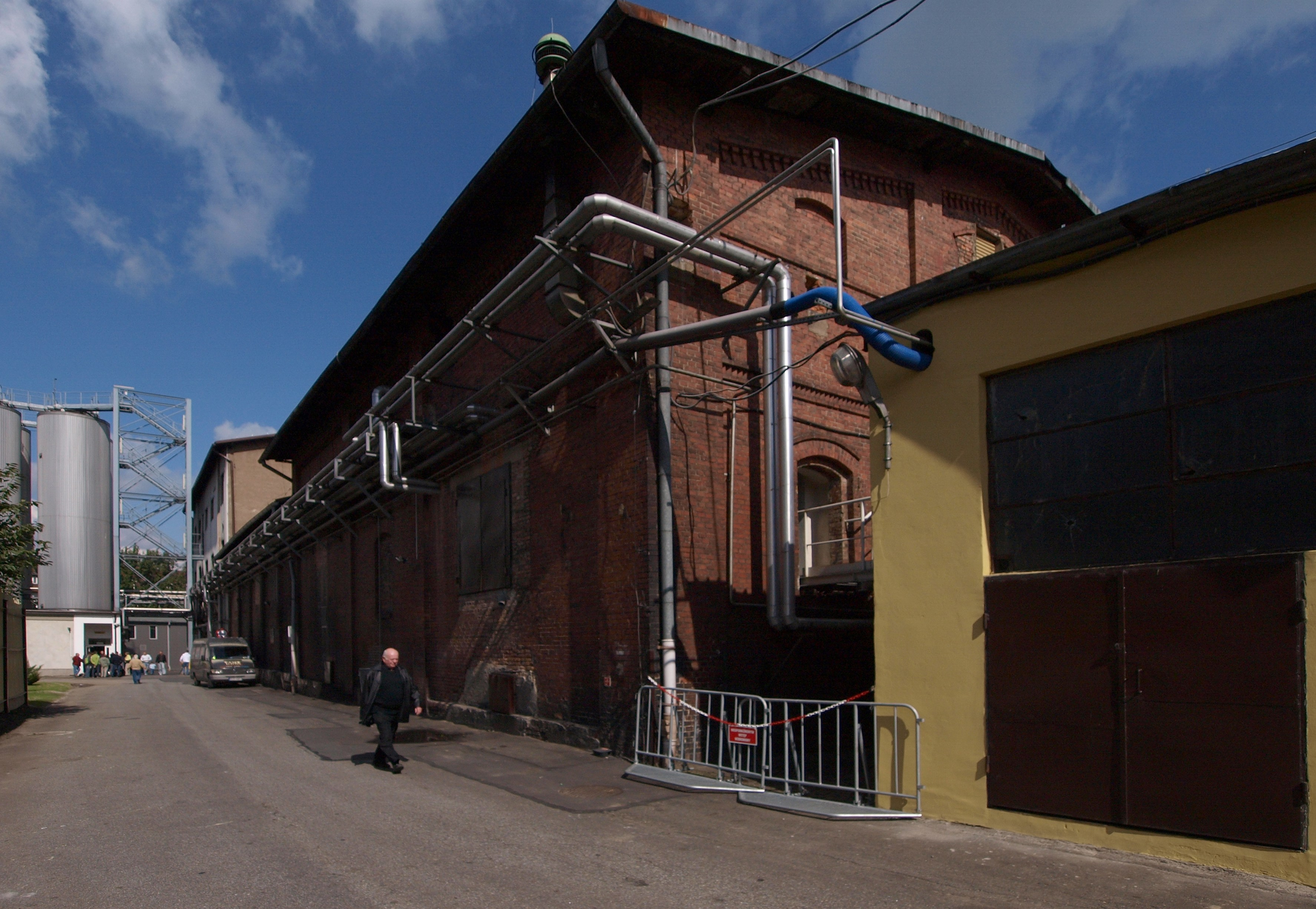 Browary Górnośląskie w Zabrzu. Jeden z przedwojennych budynków.